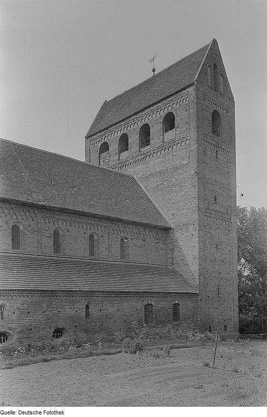 Original image description from the Deutsche Fotothek Schönhausen. Romanische Dorfkirche